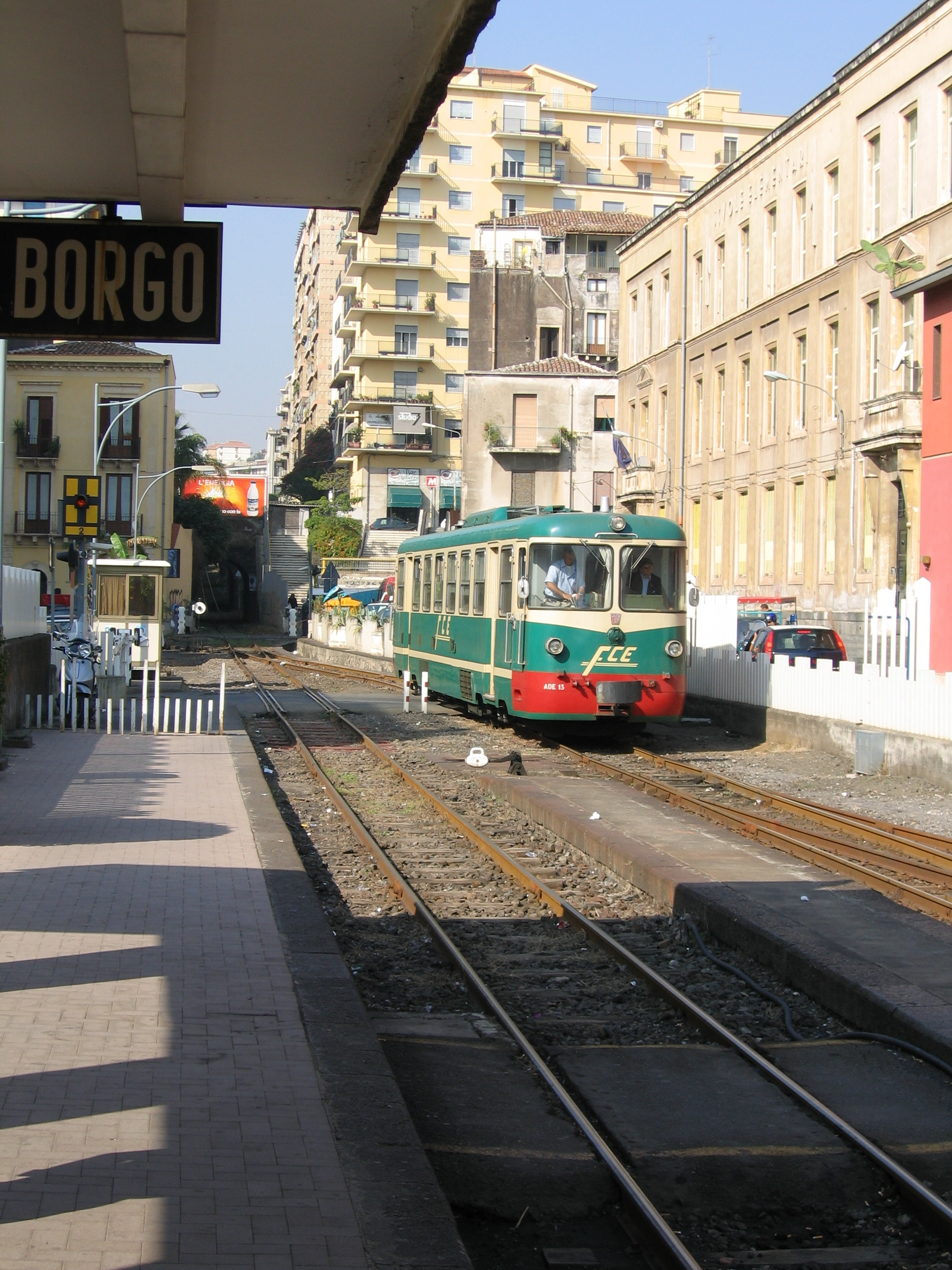 Stazione ferroviaria di Catania Borgo, con l'automotrice ADe 13.